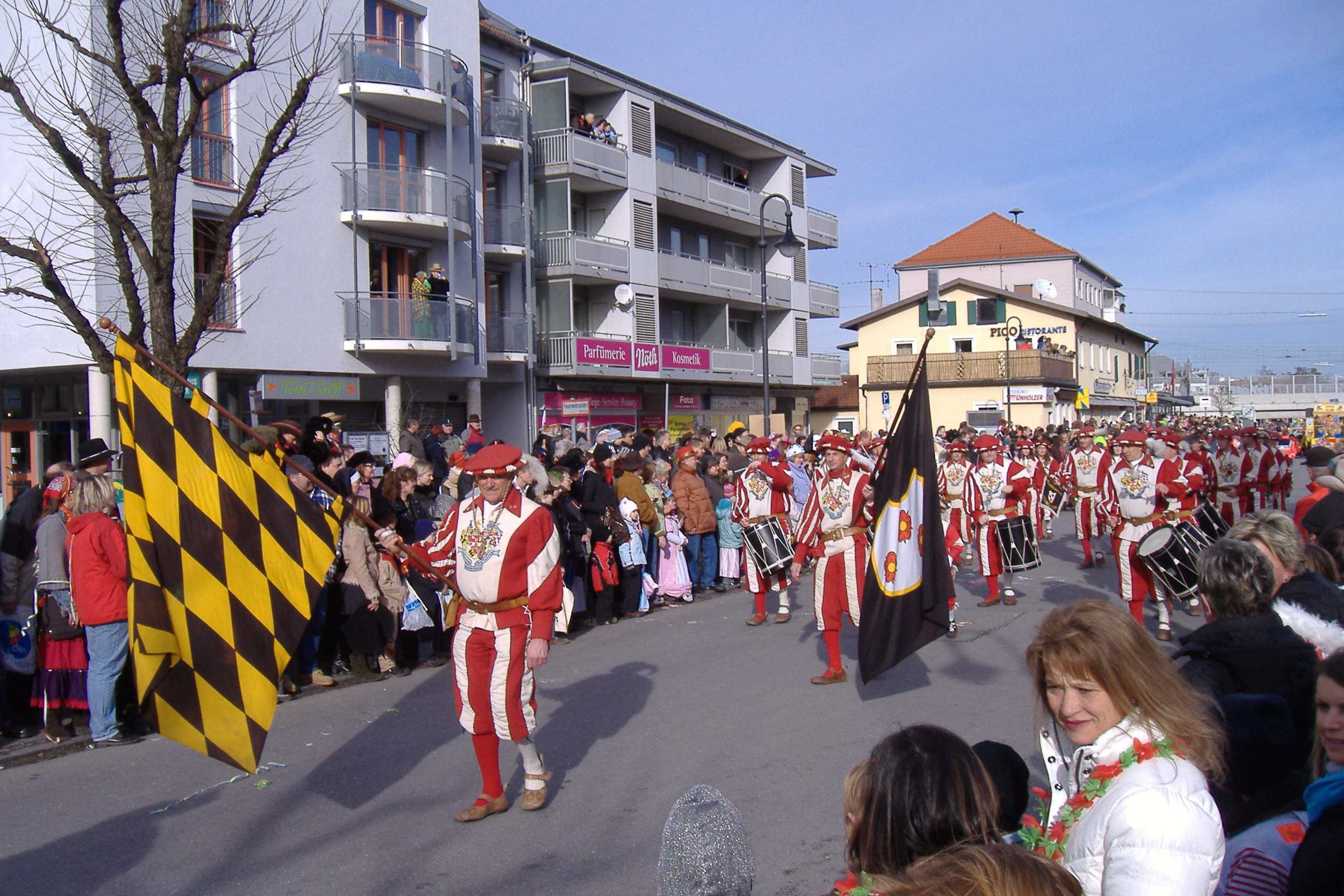 Olching Faschingsumzug Opening